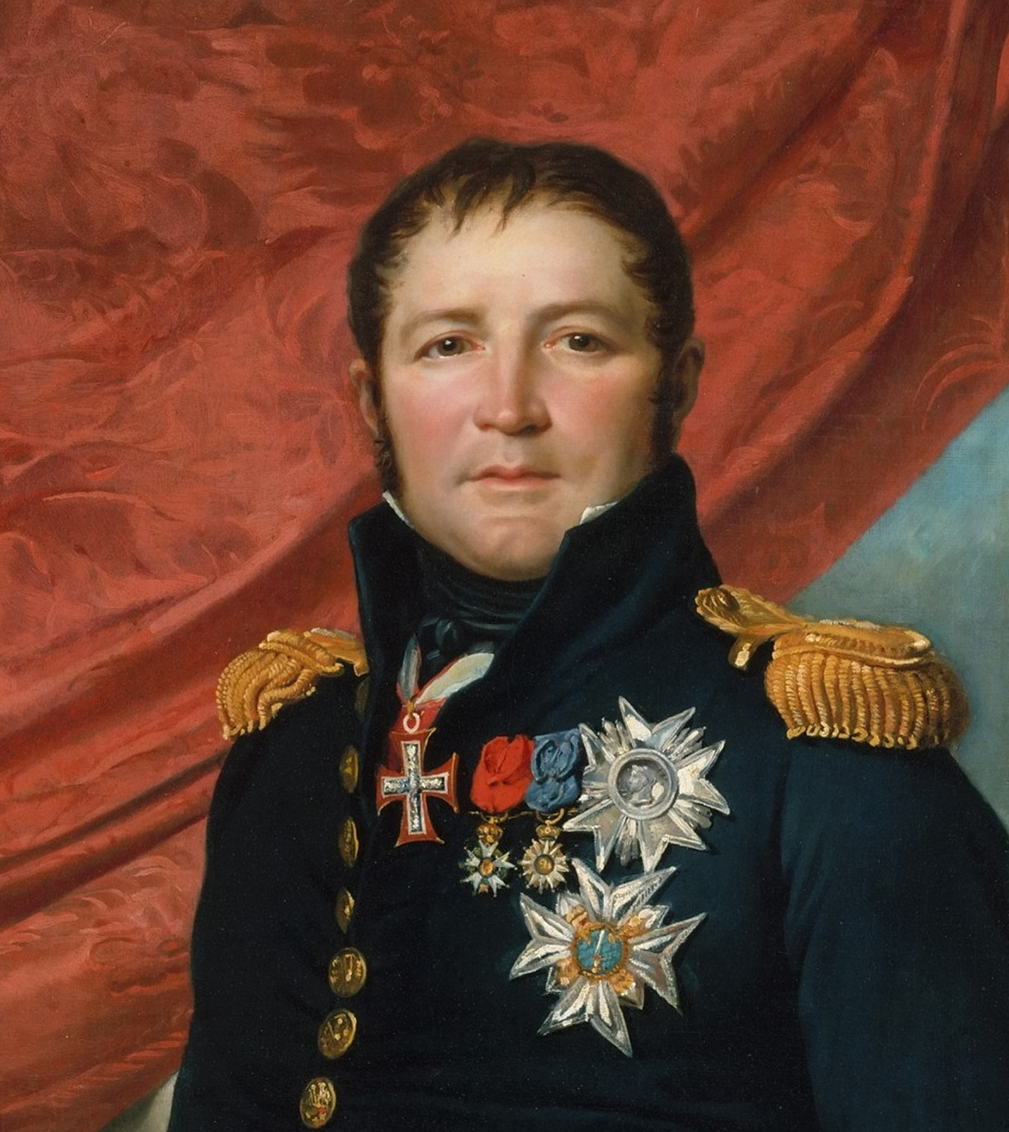 detail